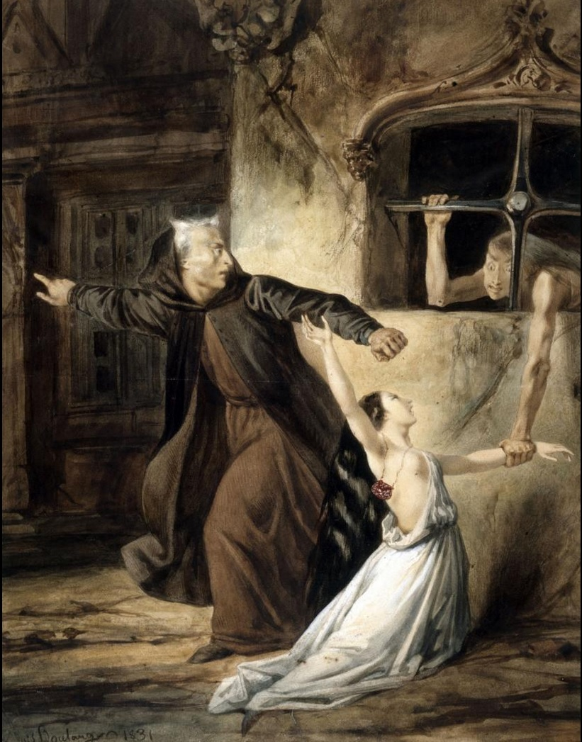 Claude Frollo livre la Esmeralda à la Sachette. Dessin de Louis Candide Boulanger, 1831.